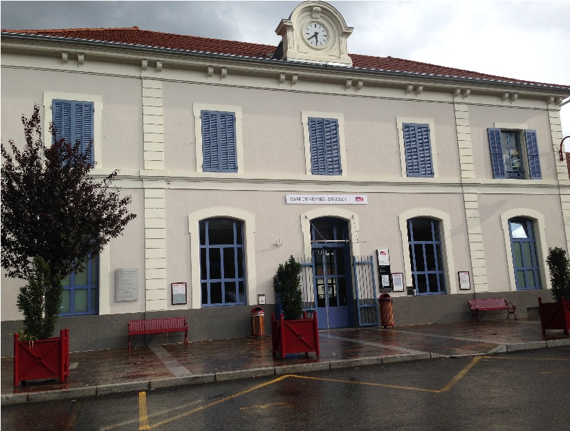 Gare de Veynes-Dévoluy-2015